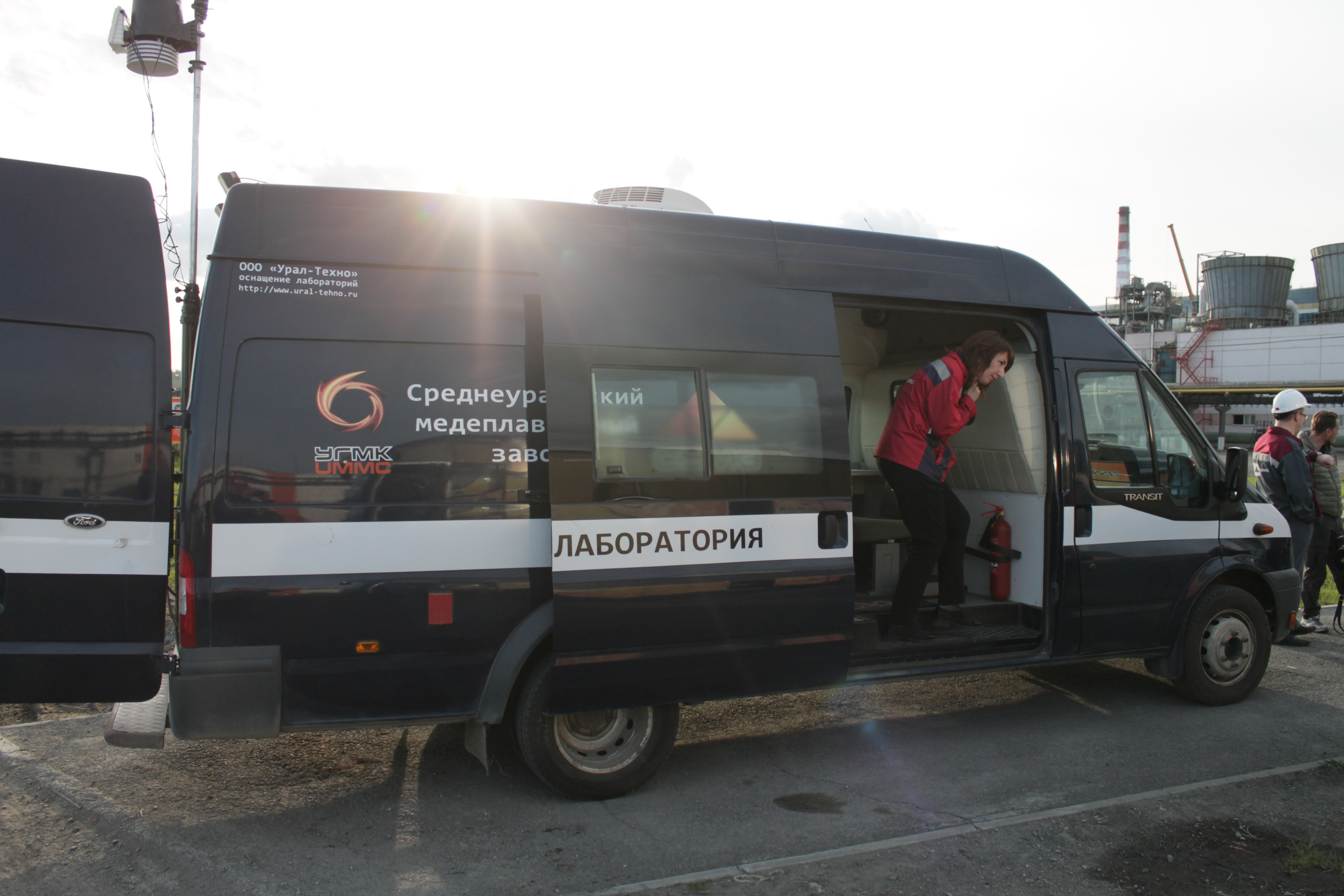 СУМЗ. Мобильная эколаборатория